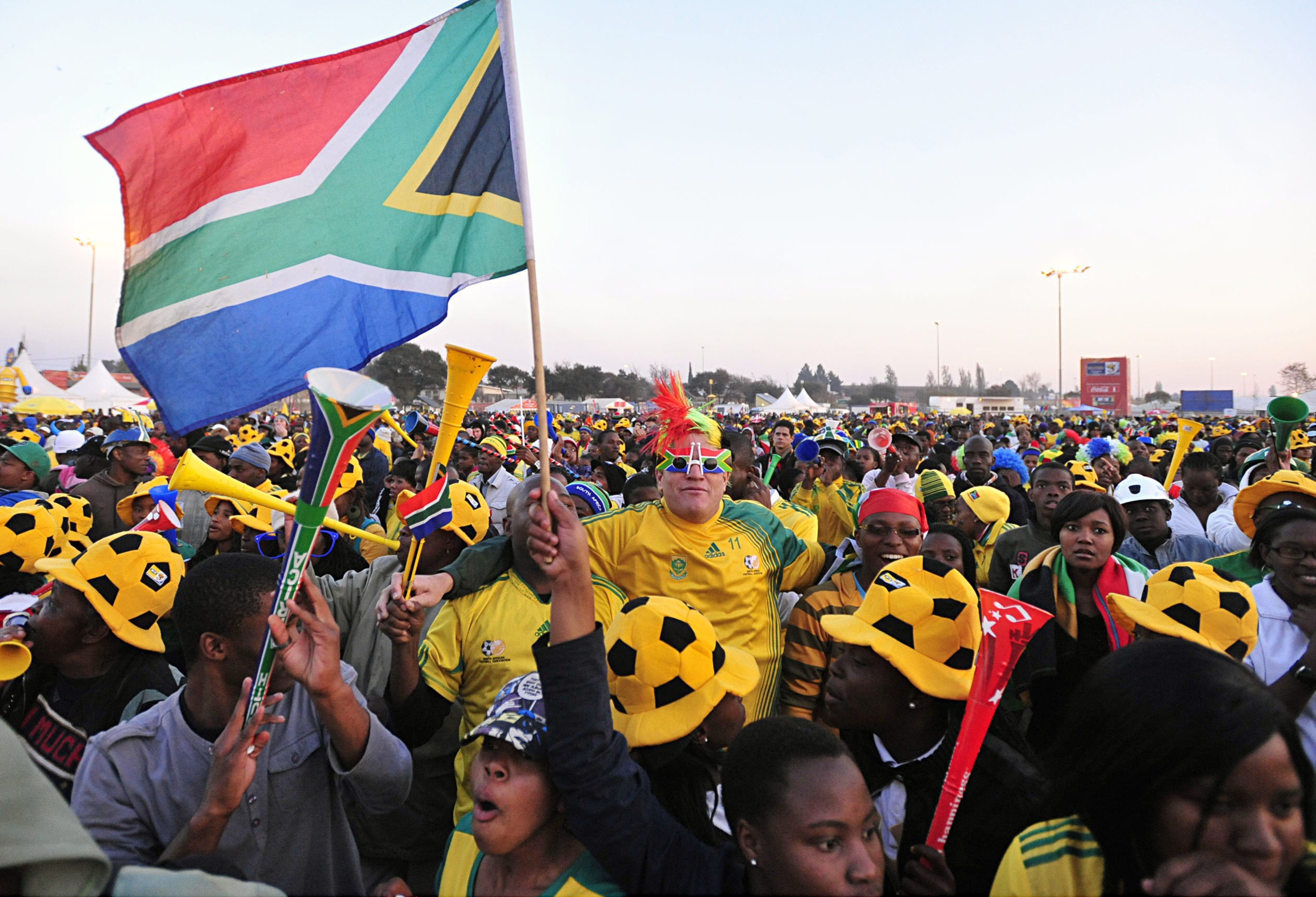 Joanesburgo - Sul-africanos fazem festa em Soweto, mesmo depois que a seleção de futebol do país foi eliminada da Copa do Mundo.